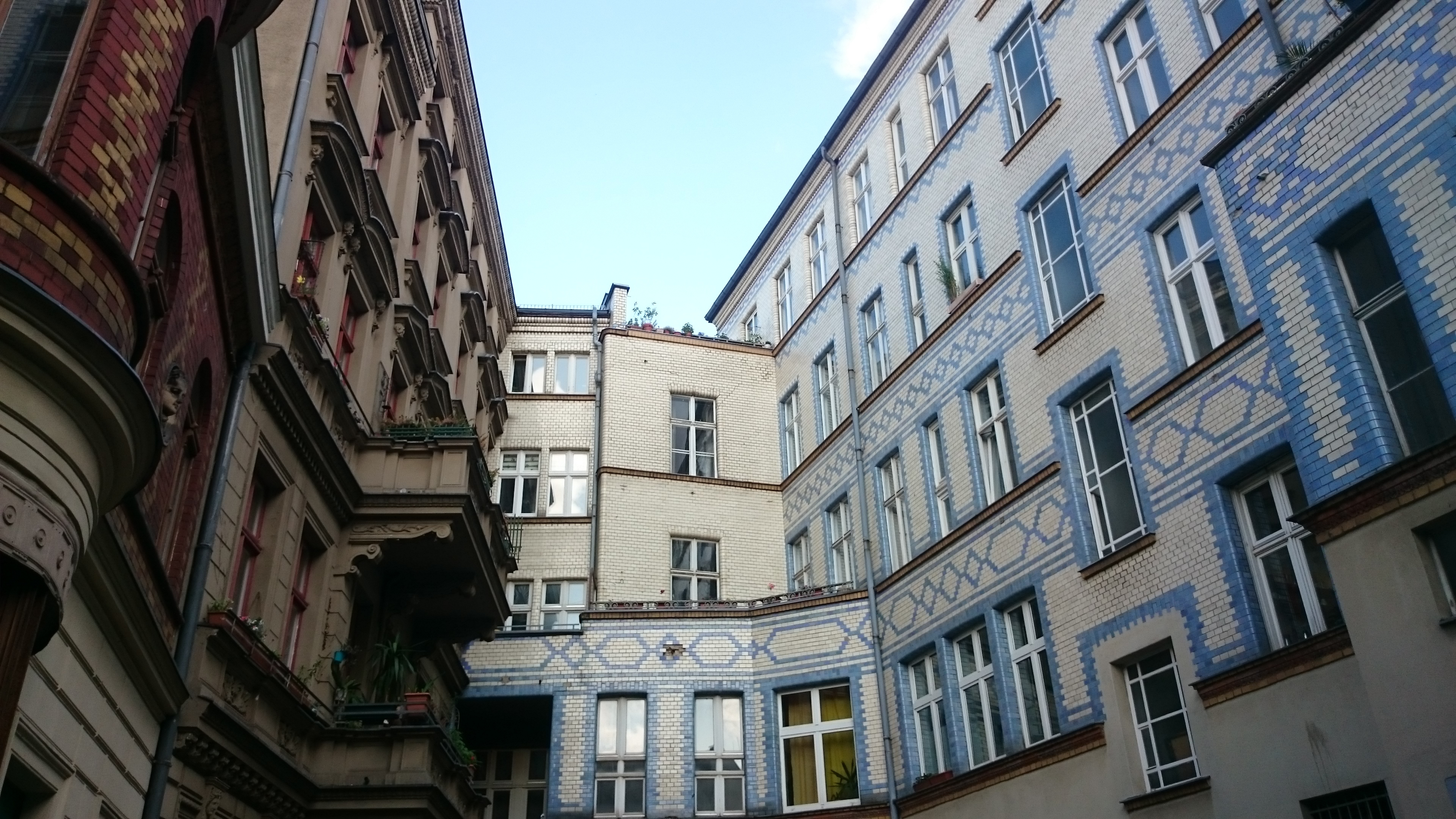 Berlin, ehemaliger Bezirk Wedding, 2016; Badstraße 35 im Hinterhof